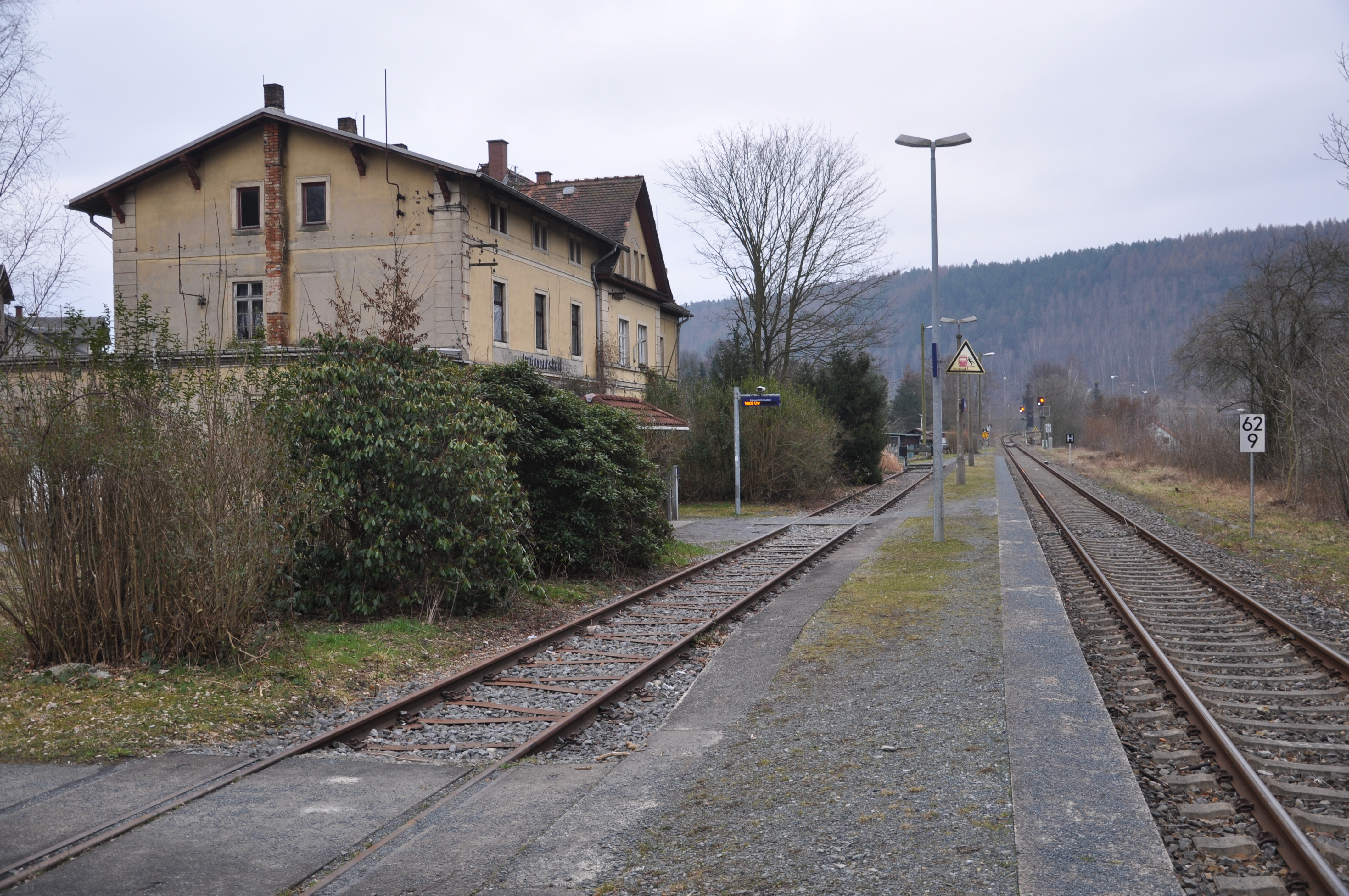 Haltepunkt Rathmannsdorf (Kr Pirna), Sebnitztalbahn